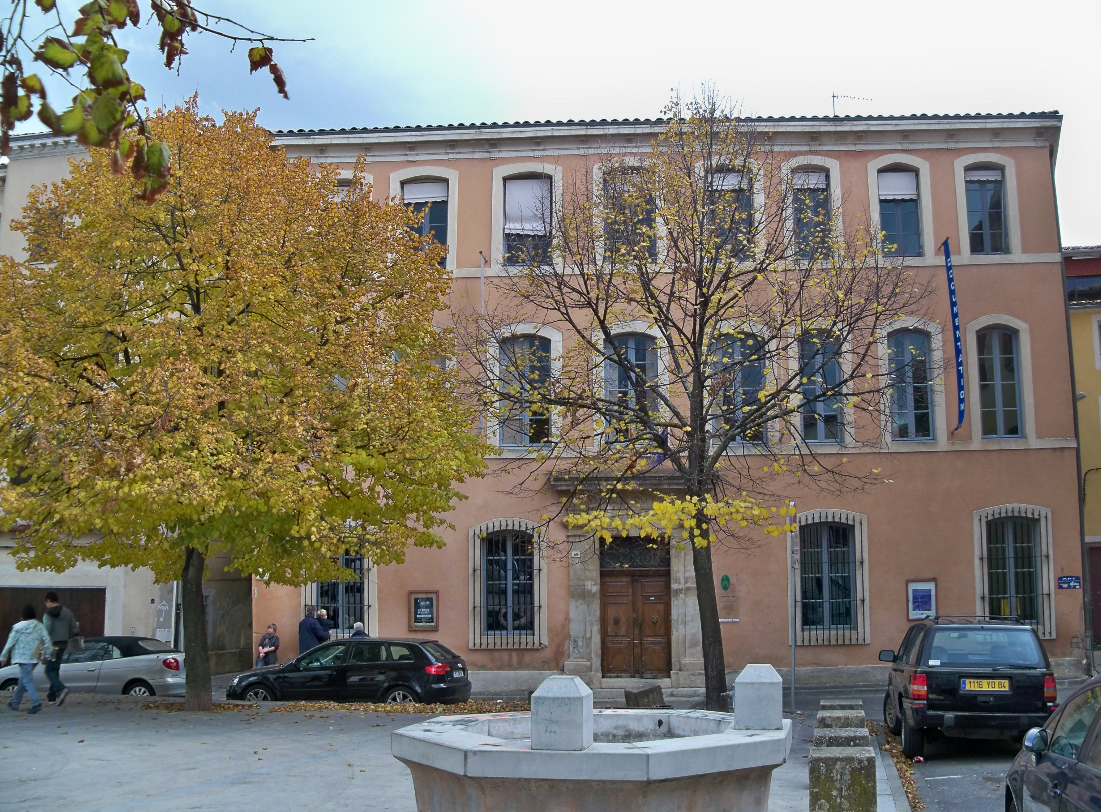 Maison du Parc du Luberon et musée de Géologie, à Apt (Vaucluse, France)